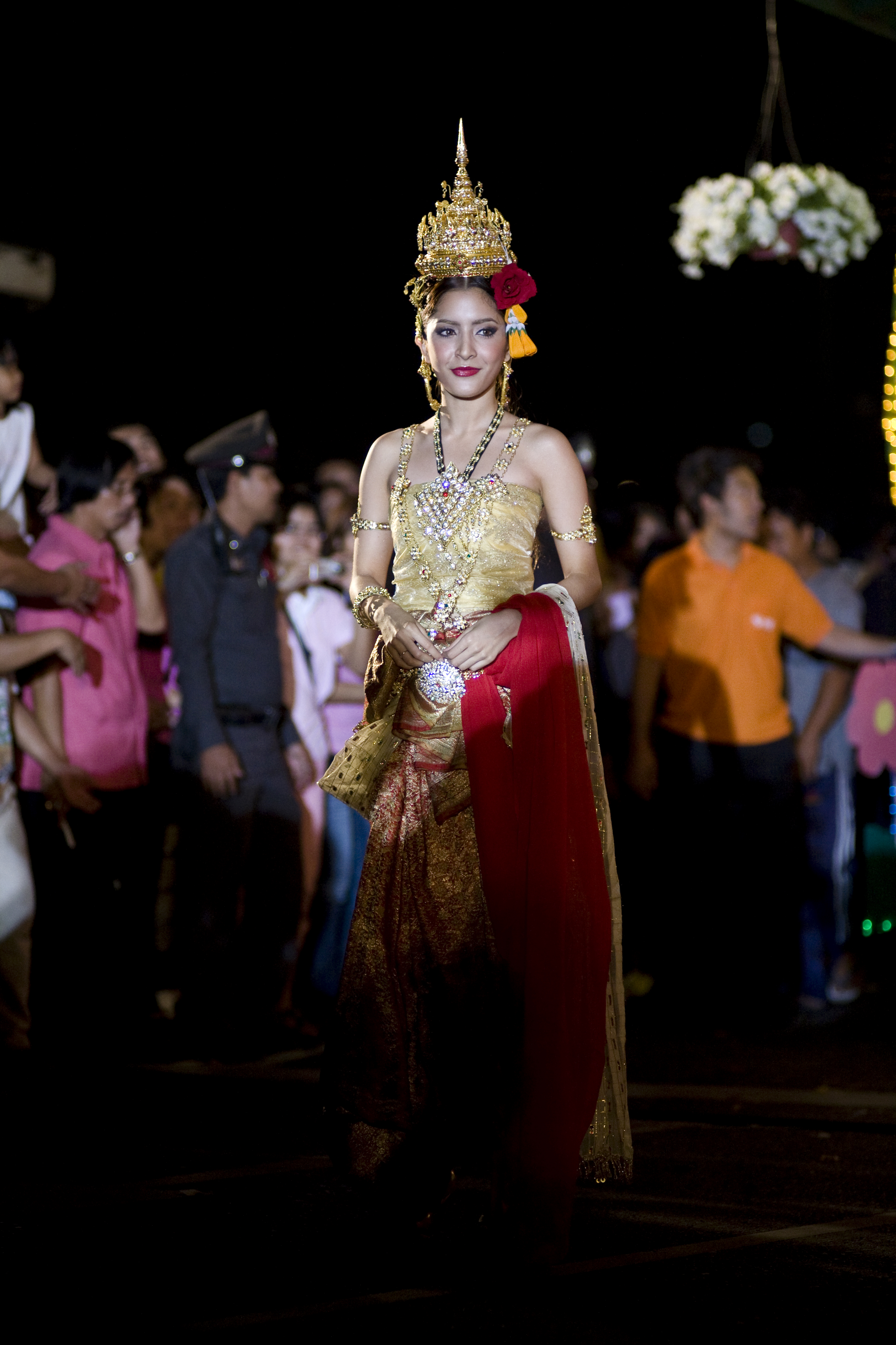 พิงกี้ สาวิกา ไชยเดช / พิธีเปิดแสงไฟเฉลิมพระเกียรติพระบาทสมเด็จพระเจ้าอยู่หัว 82 พรรษา 5ธันวาคม ณ เวทีป้อมมหากาฬ ถ.ราชดำเนิน กรุงเทพมหานคร 3ธันวาคม2552 (The Official Site of The Prime Minister of Thailand Photo by พีรพัฒน์ วิมลรังครัตน์)